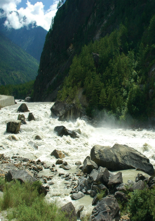 西藏林芝-雅鲁藏布江